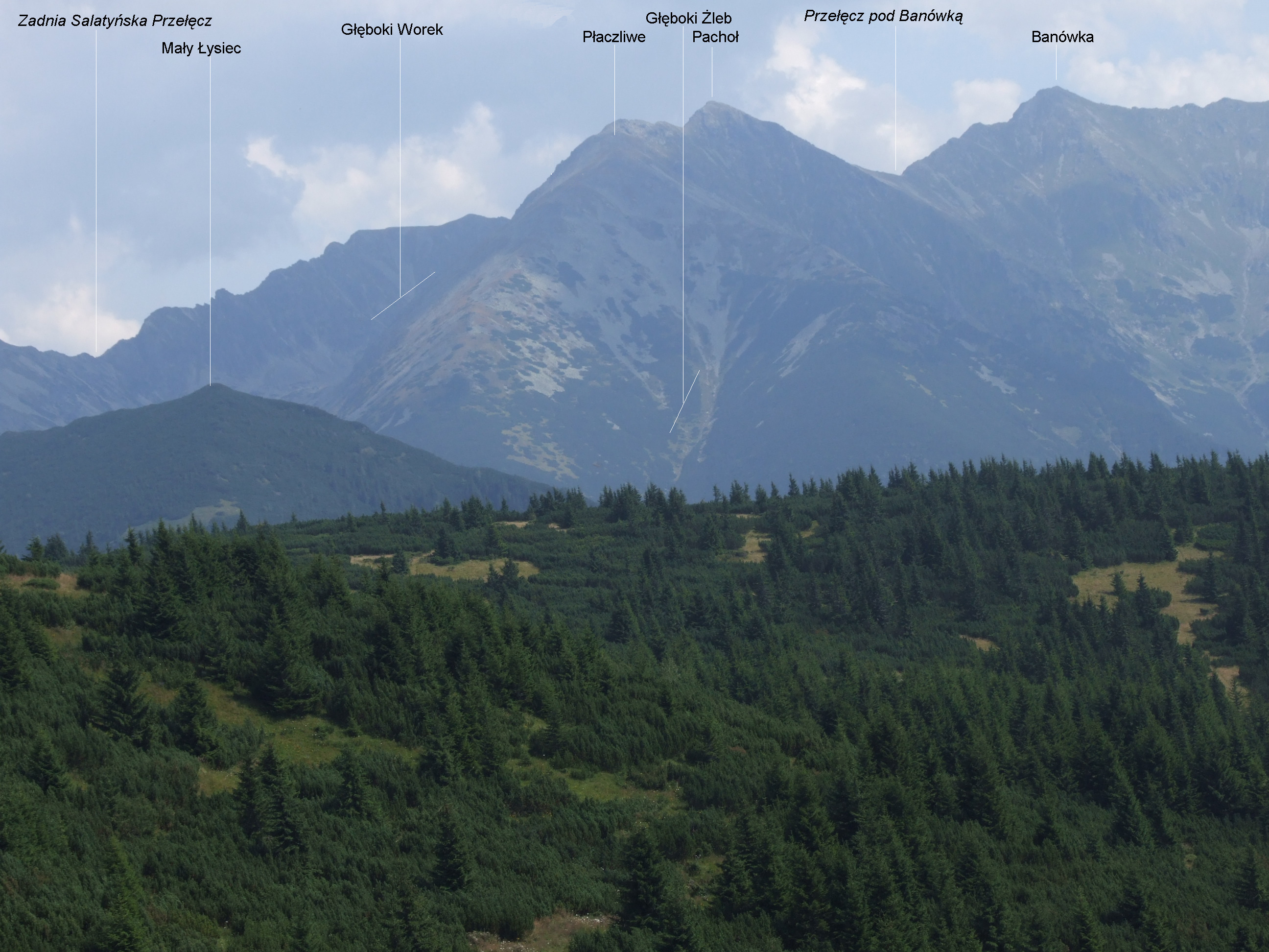 Widok z okolic Babkowej Przehyby